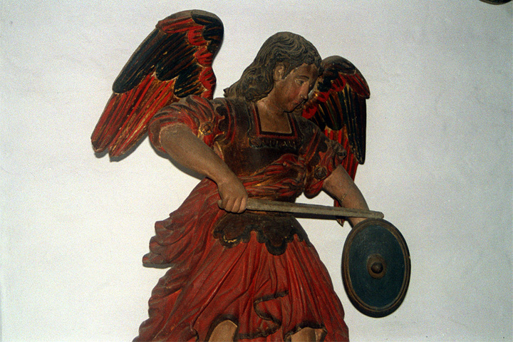 Imagen jesu´tica. Iglesia de Santa Rosa. Misiones. Paraguay